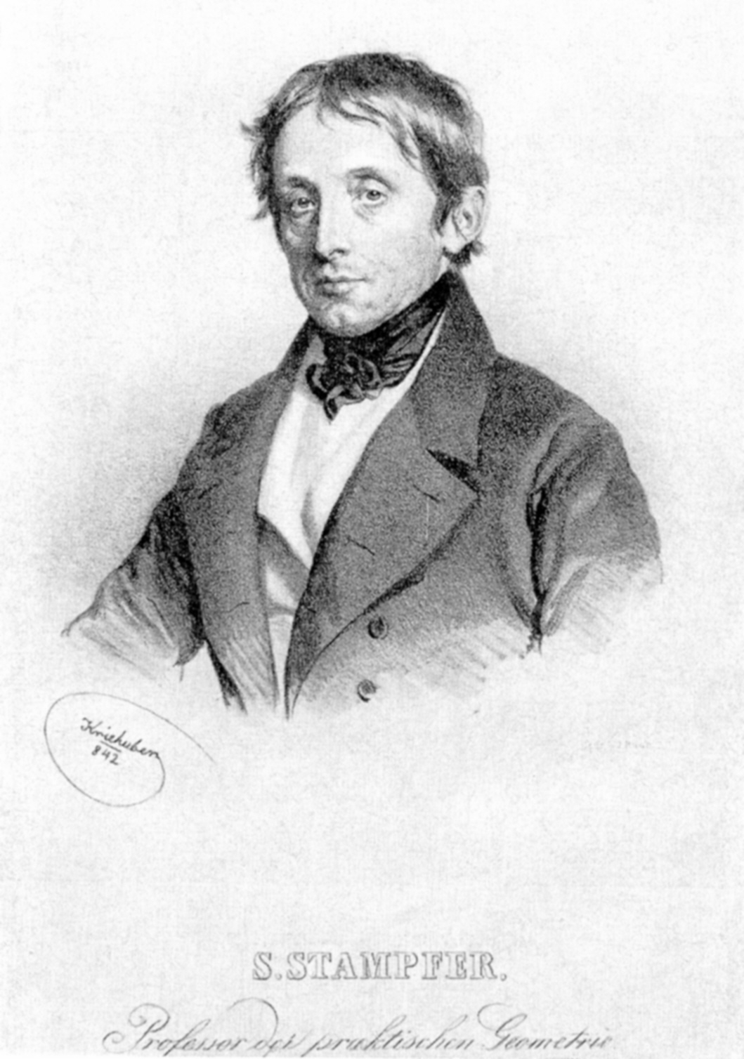 Der österreichische Mathematiker und Erfinder Simon Ritter von Stampfer in einem Porträt des (Porträt-)Malers Josef Kriehuber / en: The Austrian Inventor Simon Stampfer, portraited by the Painter Josef Kriehuber